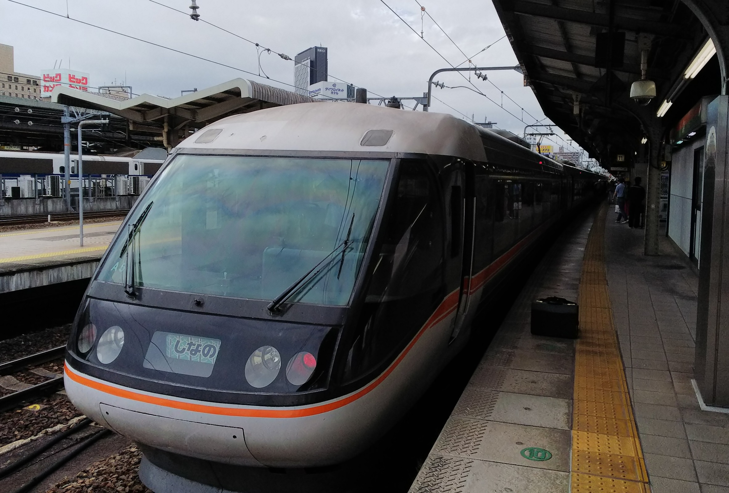 非貫通先頭車